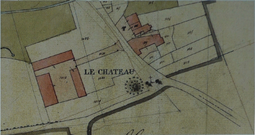 Urville, le_Chateau en 1836 sur le cadastre